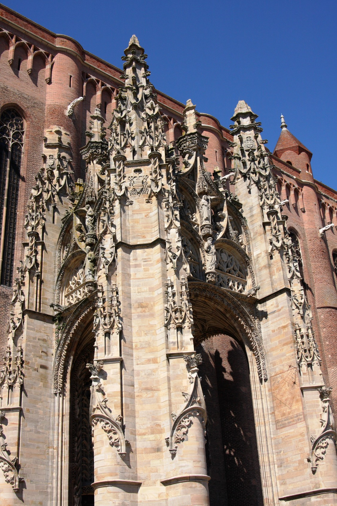 L'entrée en forme de baldaquin de la cathédrale Sainte Cécile à Albi